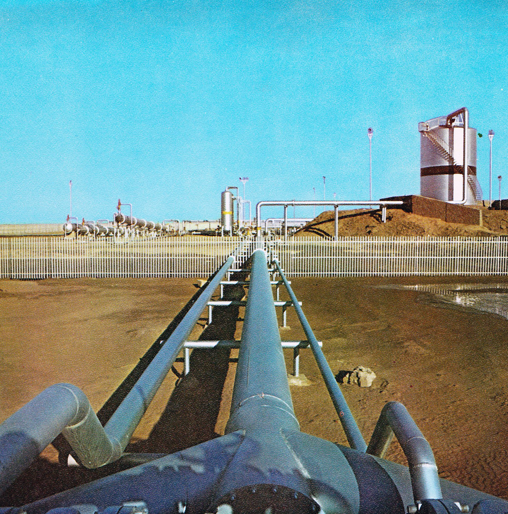 Gachsaran Oil facilities